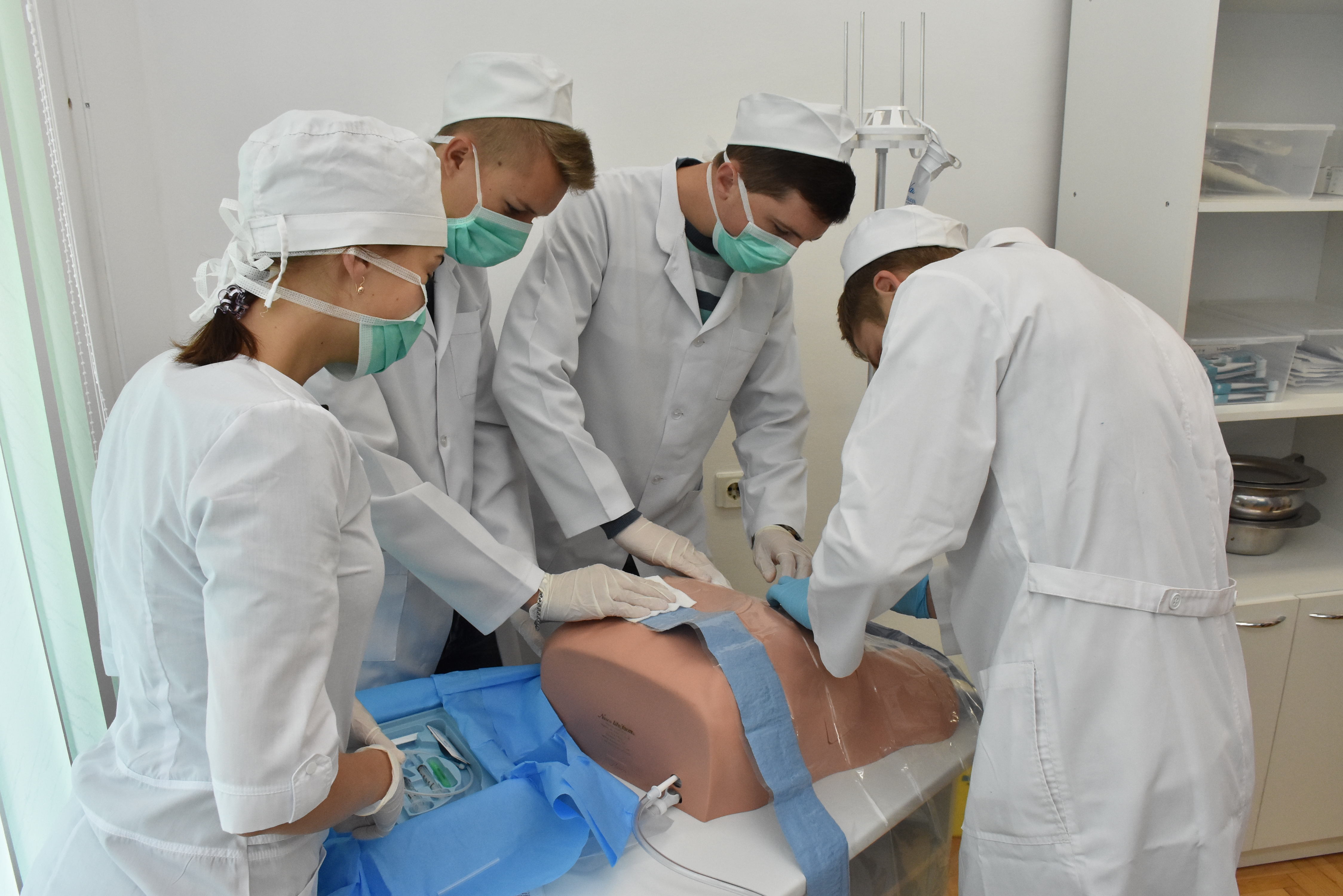 Студенти на заняттях у центрі симуляційного навчання Тернопільського державного медичного університету імені І. Я. Горбачевського.